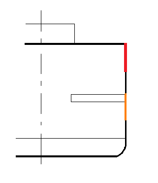 Hauptspant, Hauptdeckschergang (rot), Zwischendeckschergang (orange), Schematischer Ausschnitt